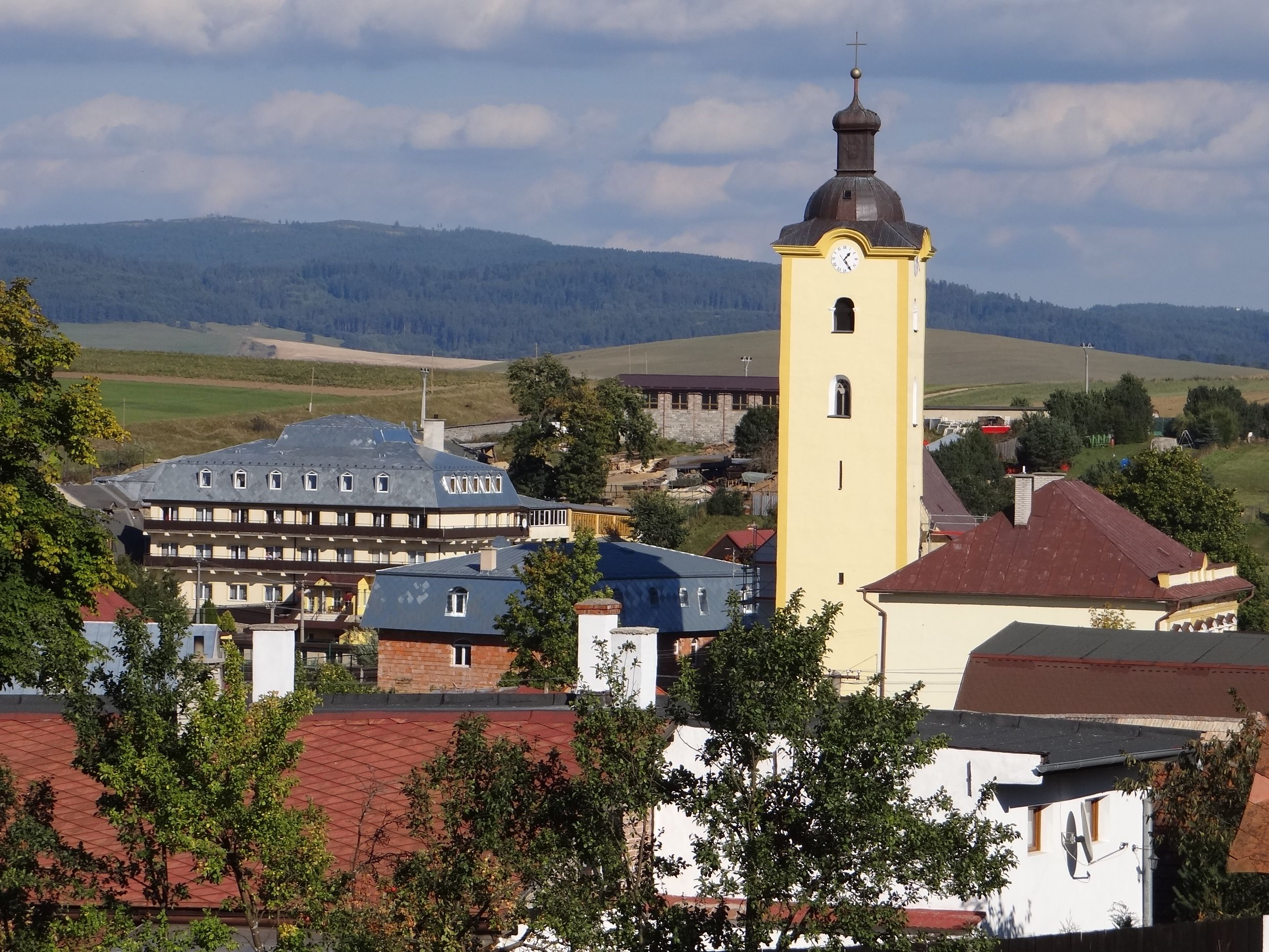 Žakovce